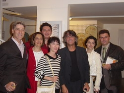 International writers in Paris Kelmendi